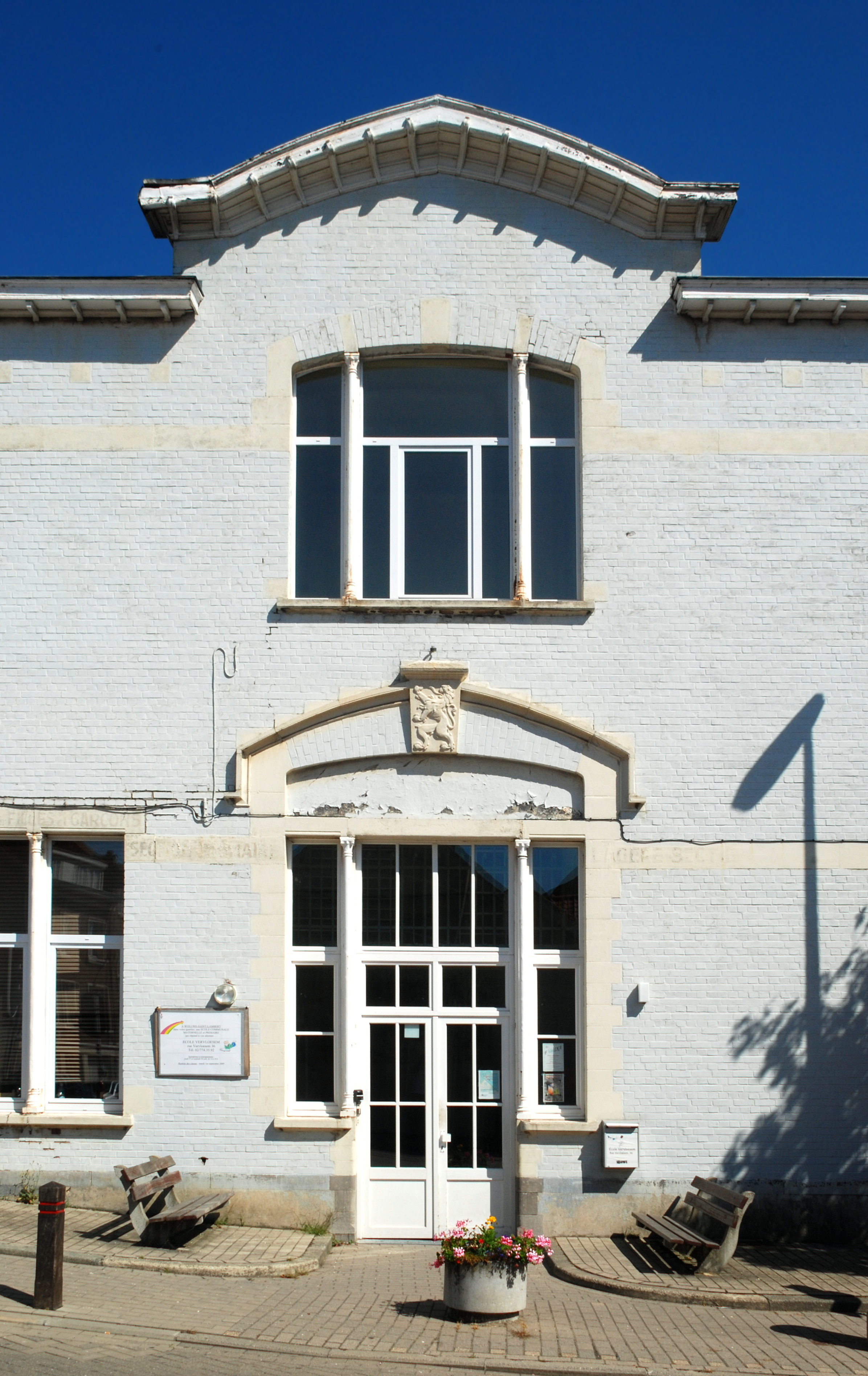 Belgique - Bruxelles - École Vervloesem